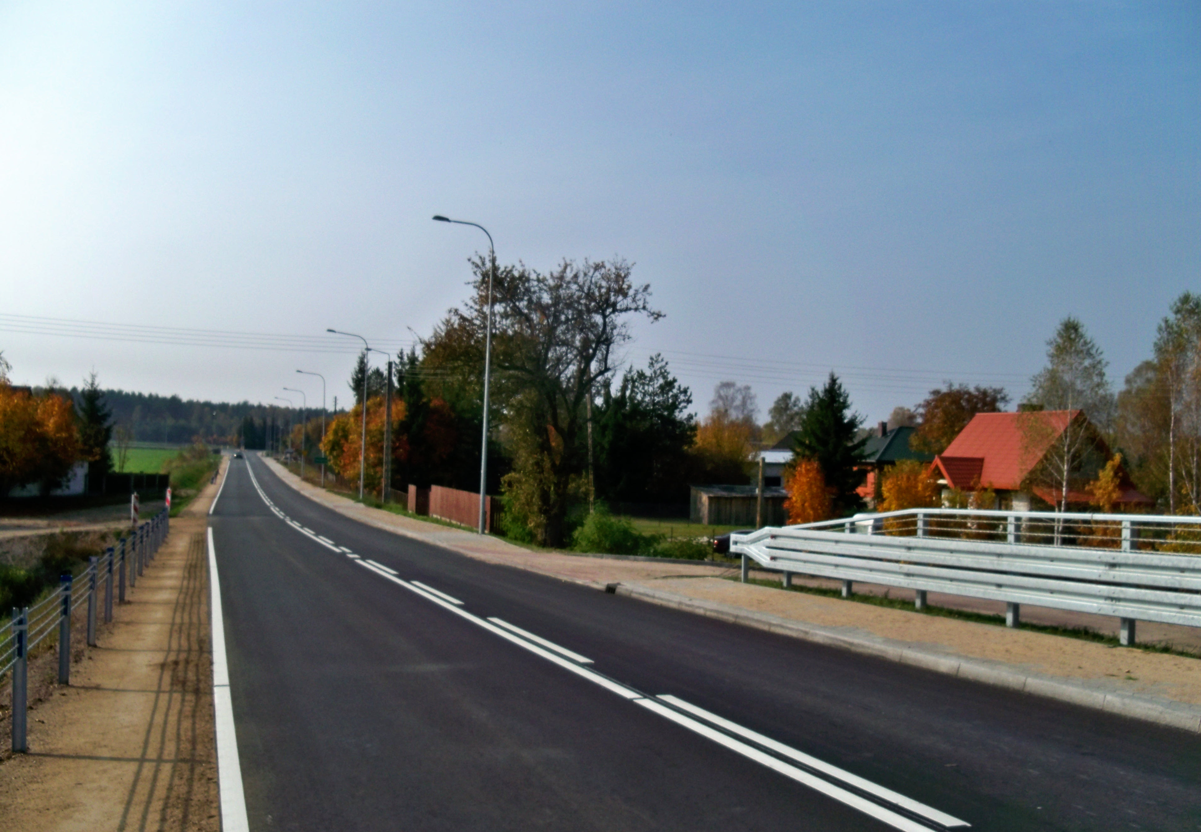 Morgowniki k. Nowogrodu, widok z mostu na Pisie